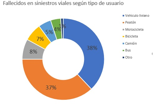 Fallecidos en siniestros viales según tipo de usuario